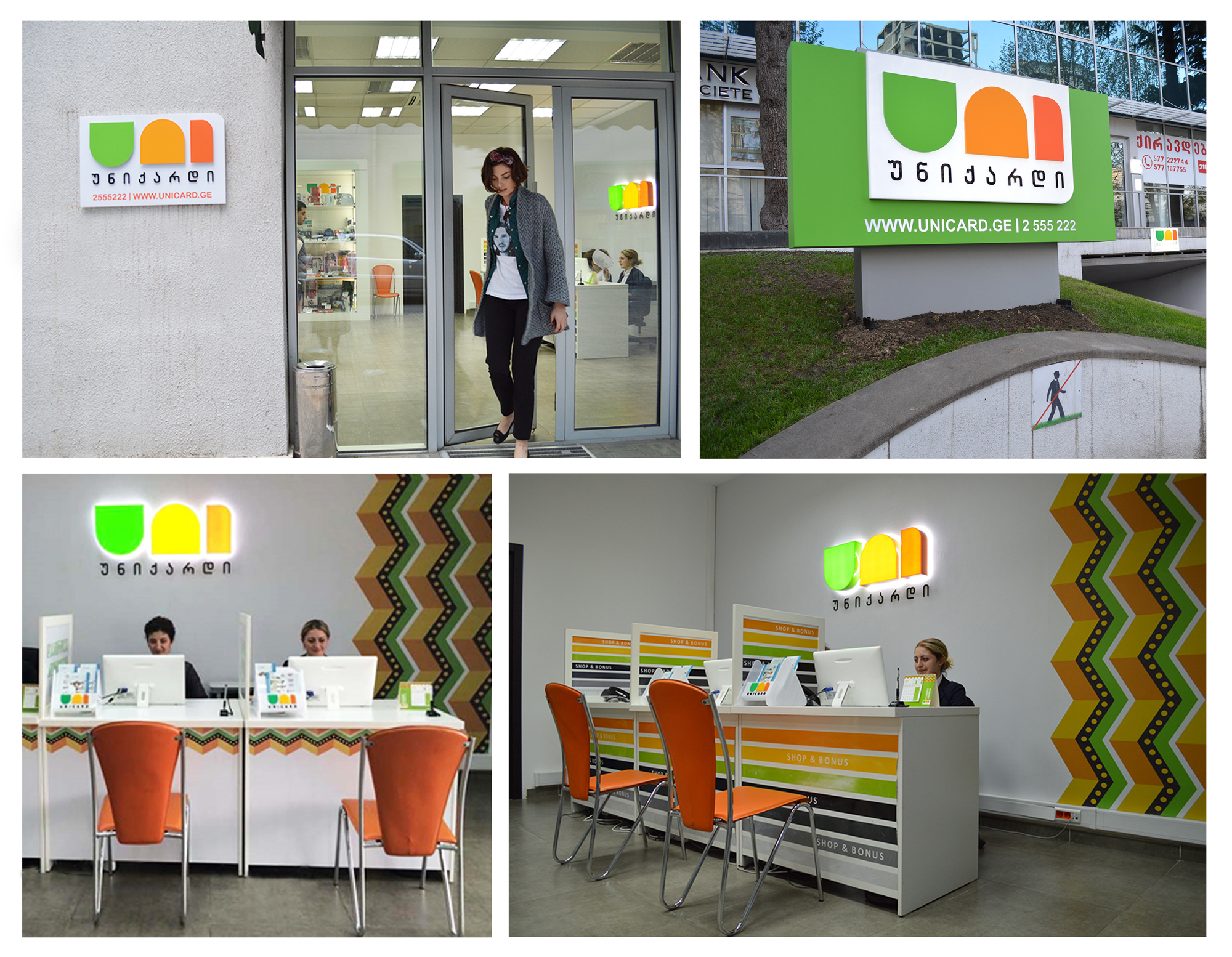 უნიქარდის მომსახურების ცენტრი თბილისში